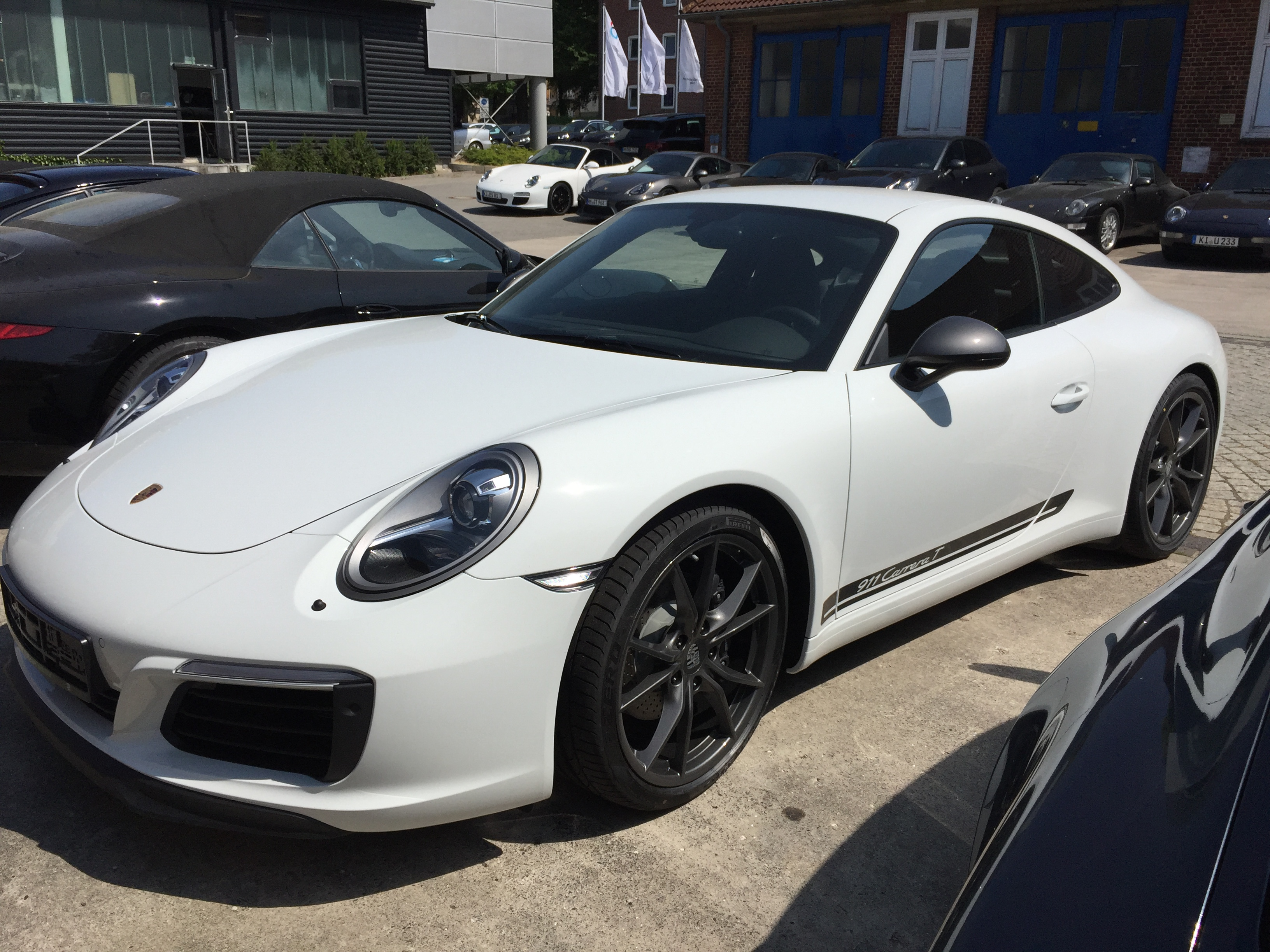 Porsche 911 (991) Carrera T